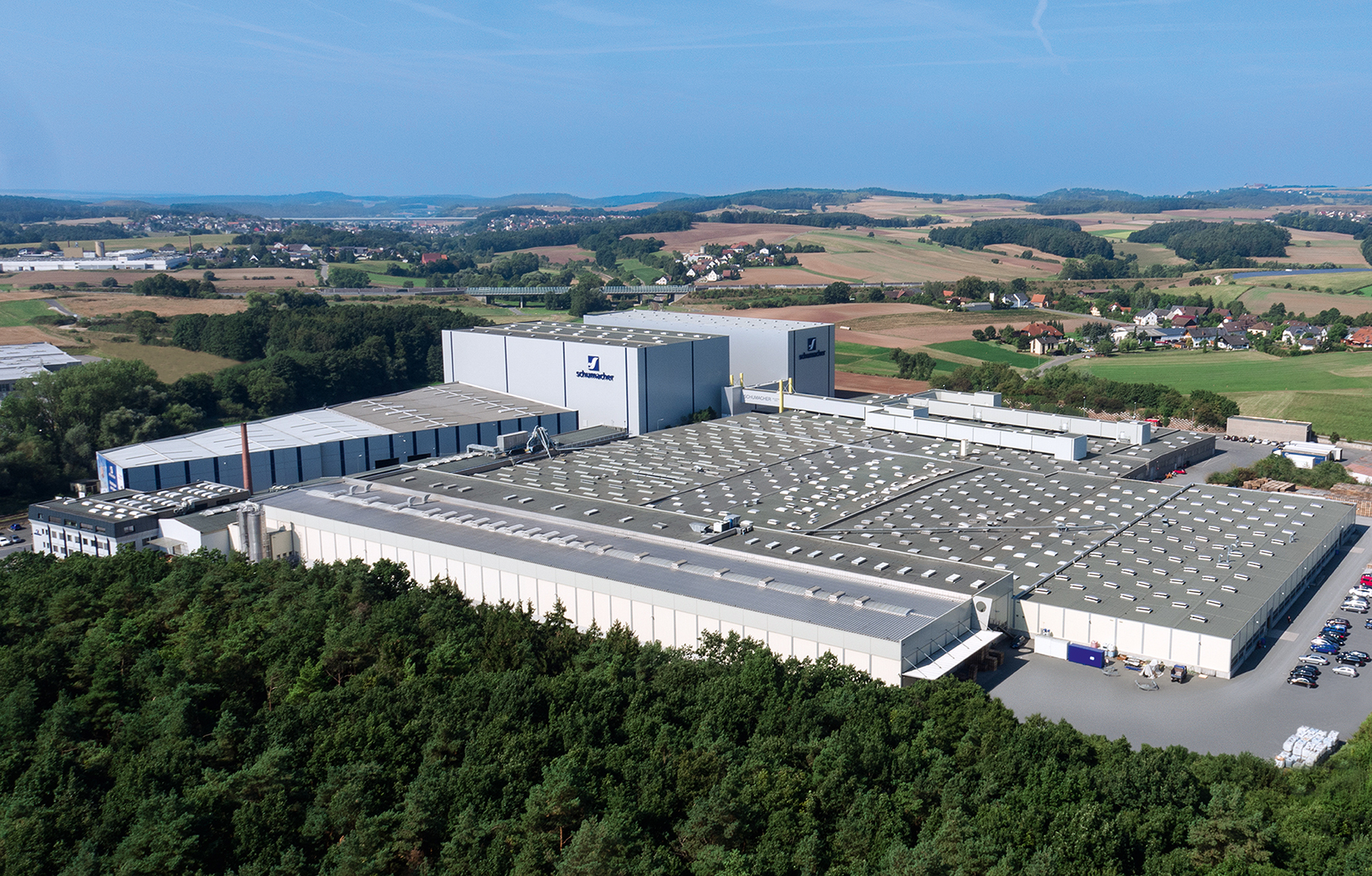 Das Hauptwerk der Schumacher Packaging Gruppe befindet sich im oberfränkischen Ebersdorf bei Coburg.